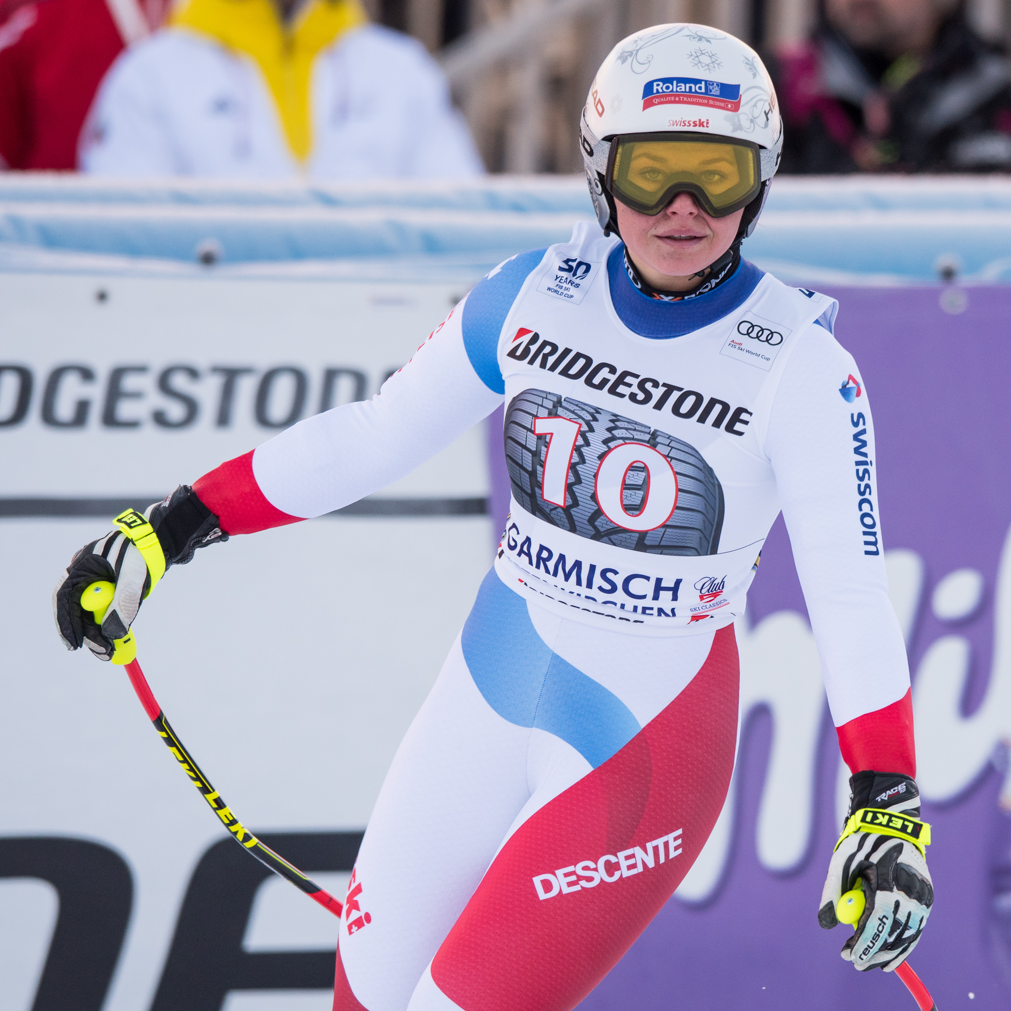 64. Kandahar Rennen,Audi FIS Ski Weltcup Garmisch-Partenkirchen,Corinne Suter,Damen Super-G,Kandahar,Ladies Super-G